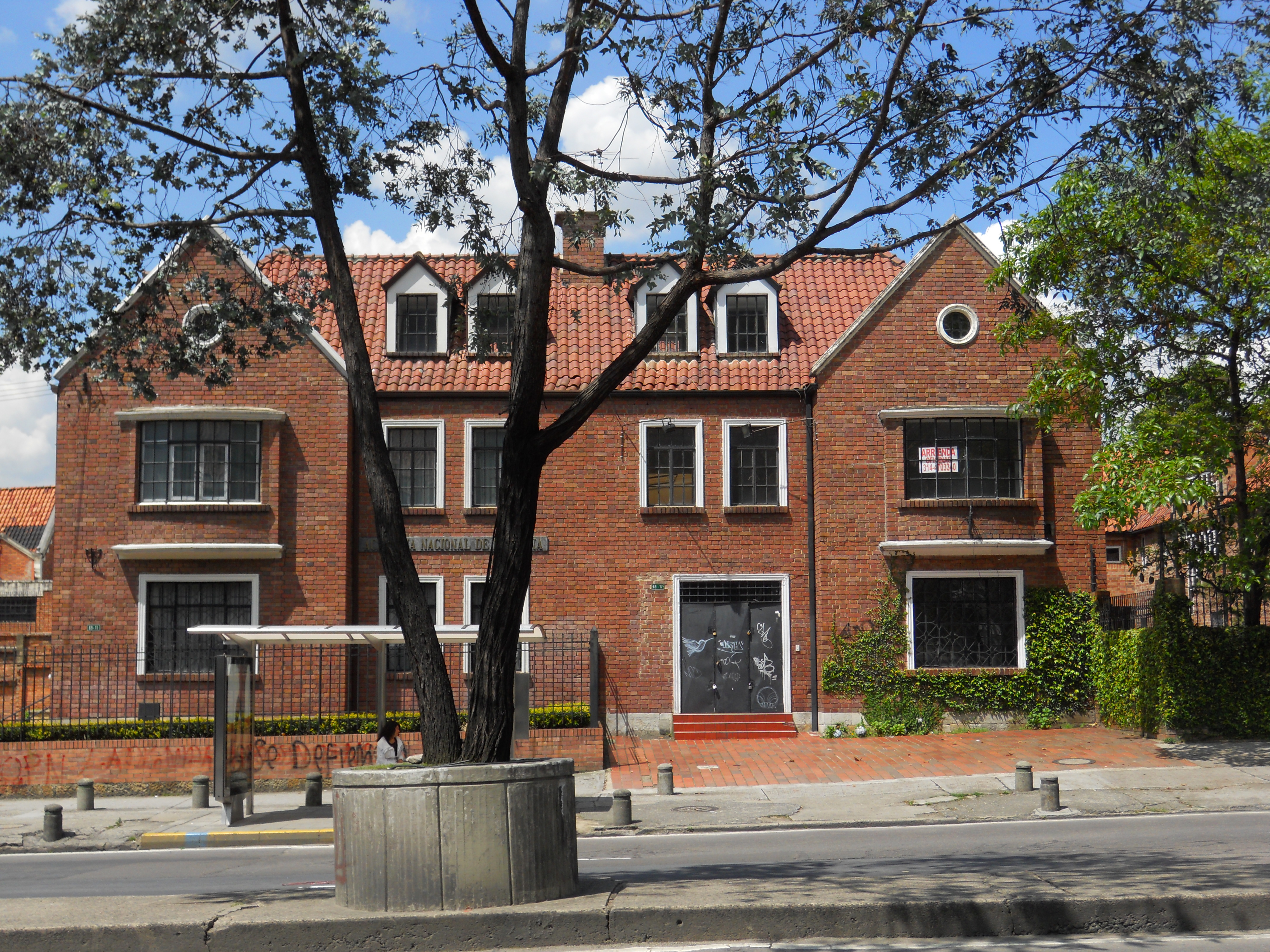 Casa en la calle 69 con cra 7 Bogotá, Chapinero. Barrio Quinta Camacho.